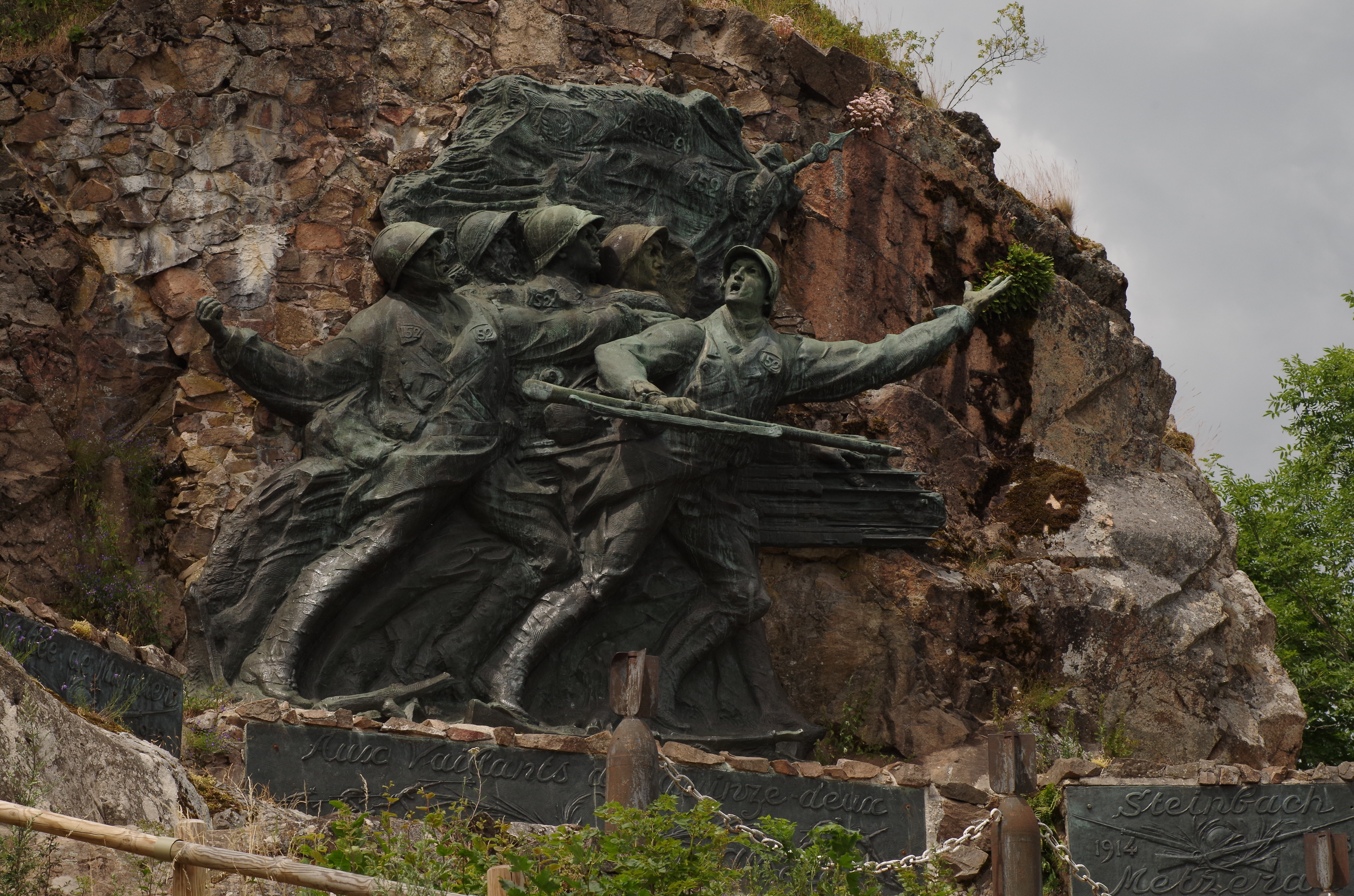 Monument sculpté par Victor-Charles Antoine en l'honneur du 152e RI à l'Hartmannswillerkopf.